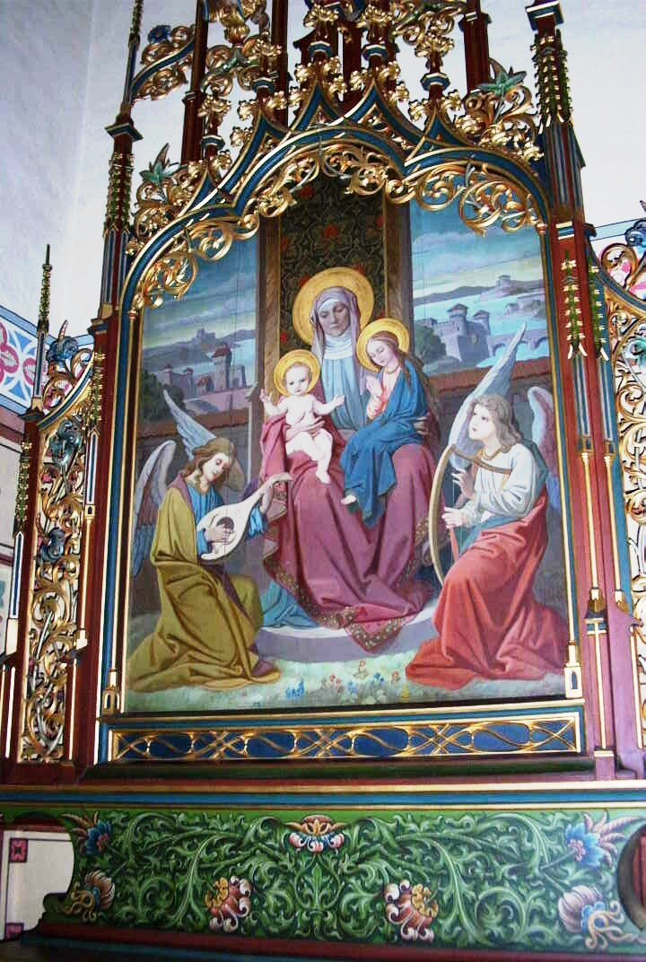 Frauenkirche_Herrieden_Seitenaltar_links